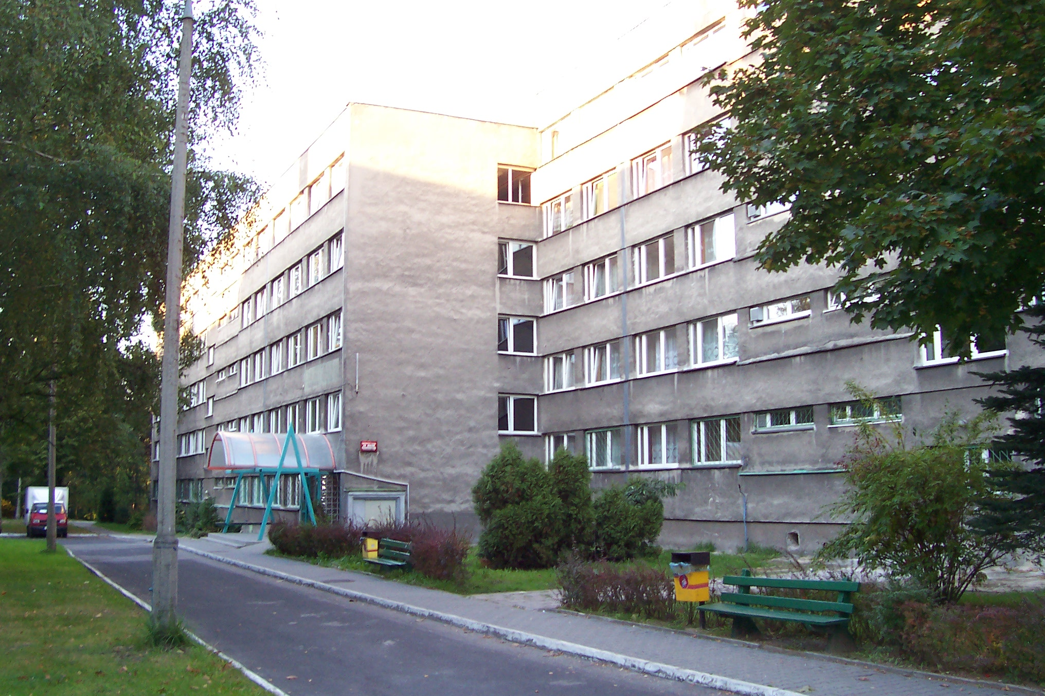 Katowice-Ligota Dom Studencki nr 2